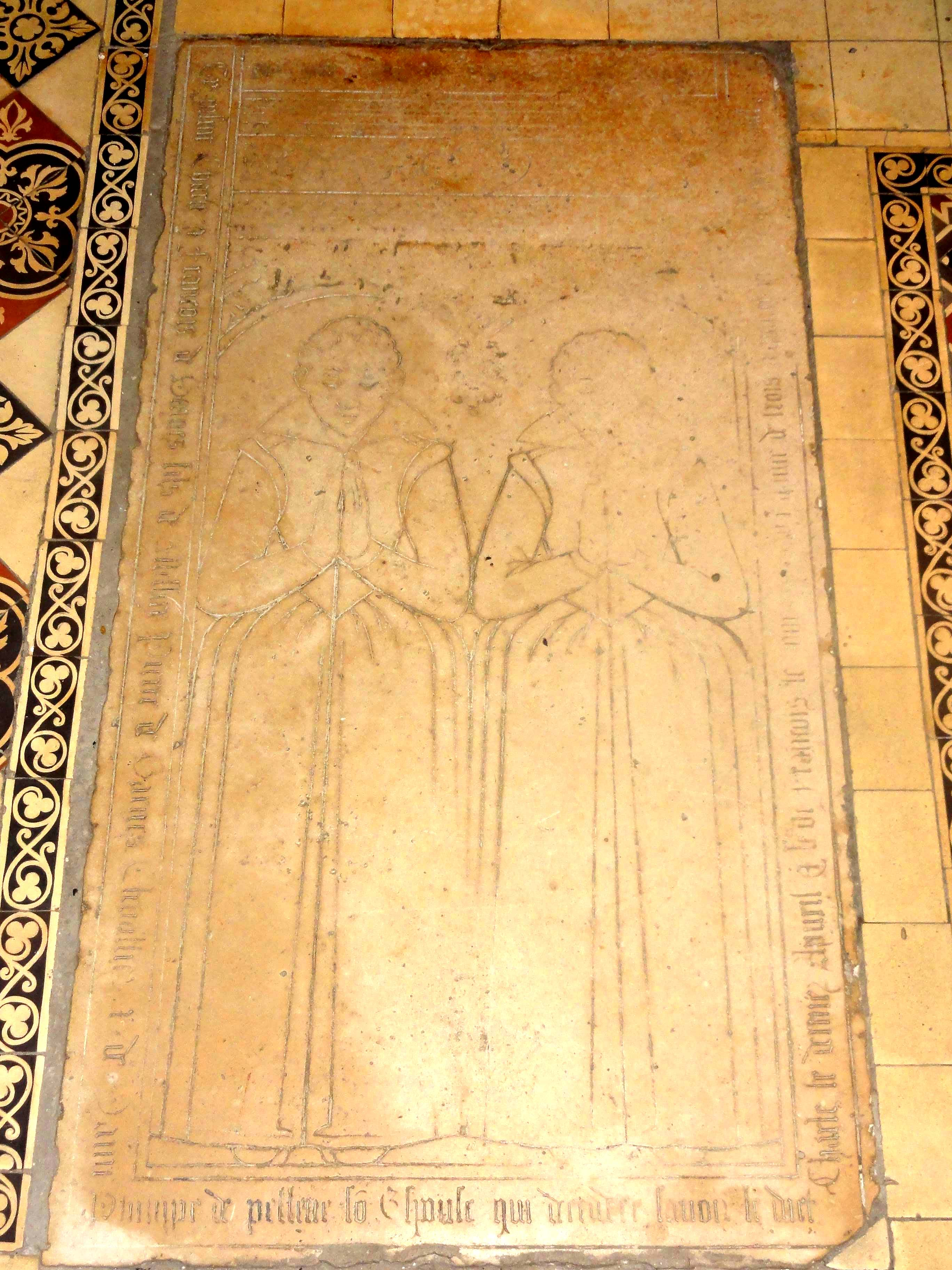 Pierre tombale.